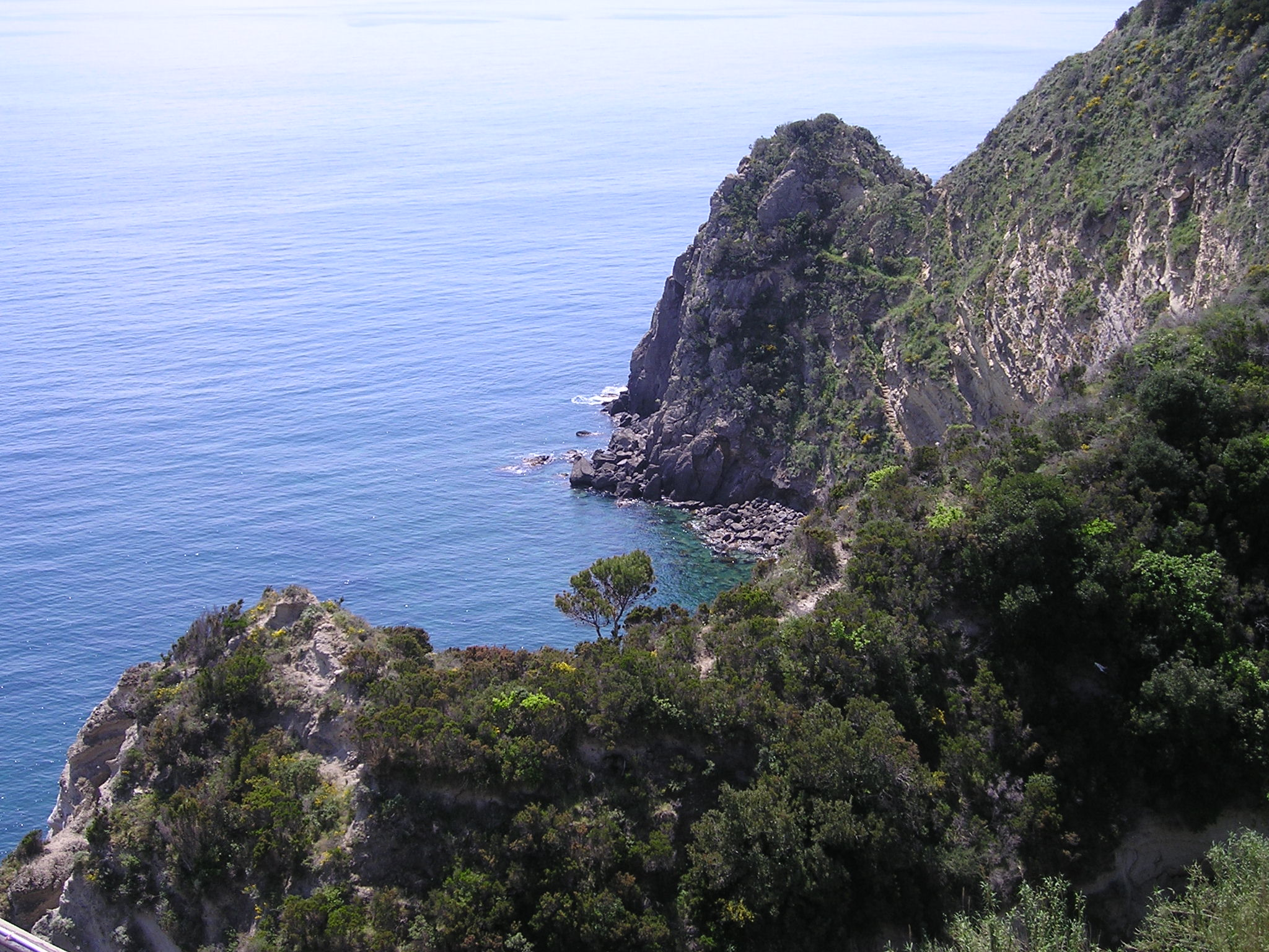 Punta Chiarito in Panza sbarco dei greci d'Eubea VIII sec a.C.